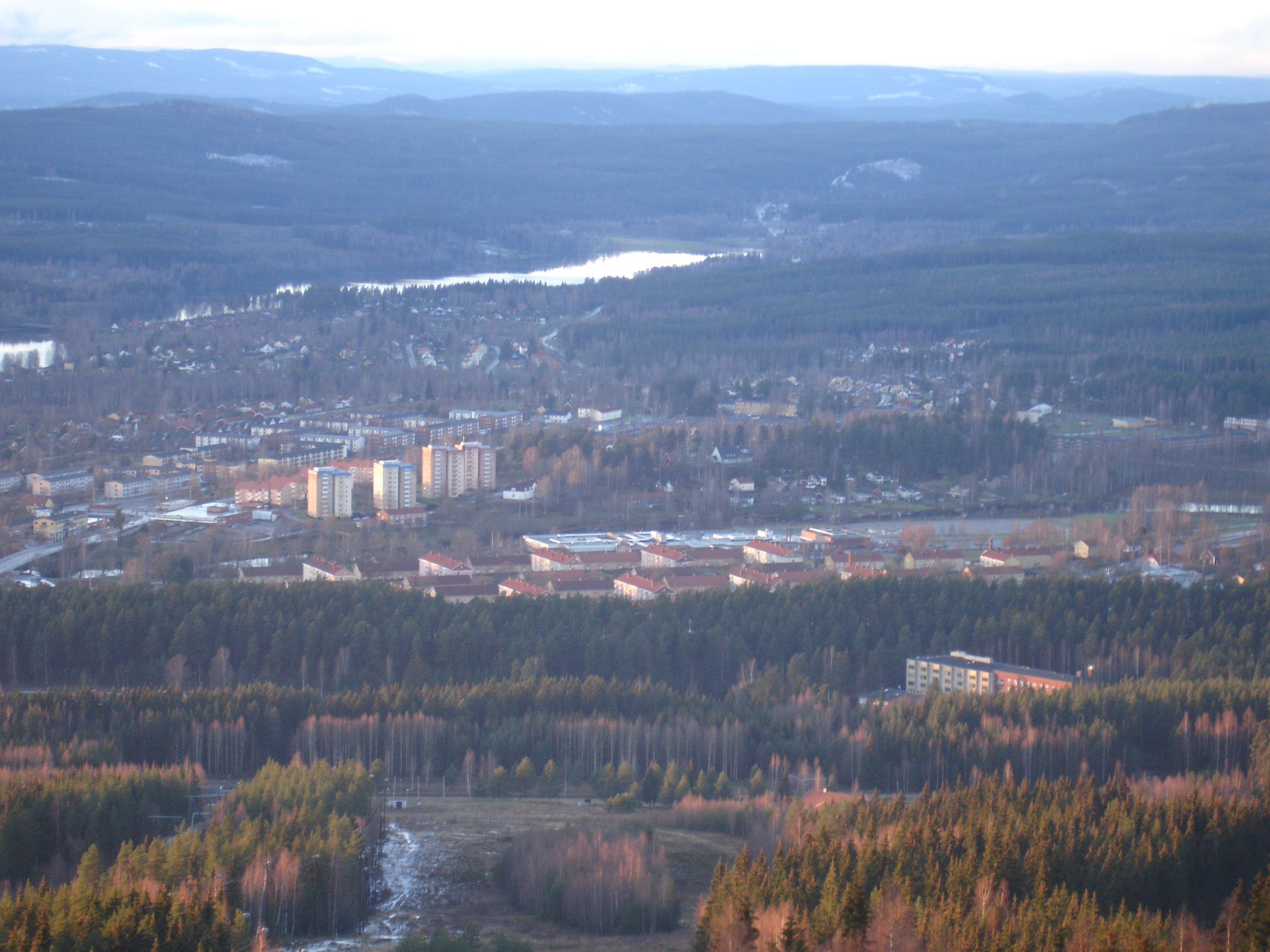 Aerial view of Hagfors, Sweden